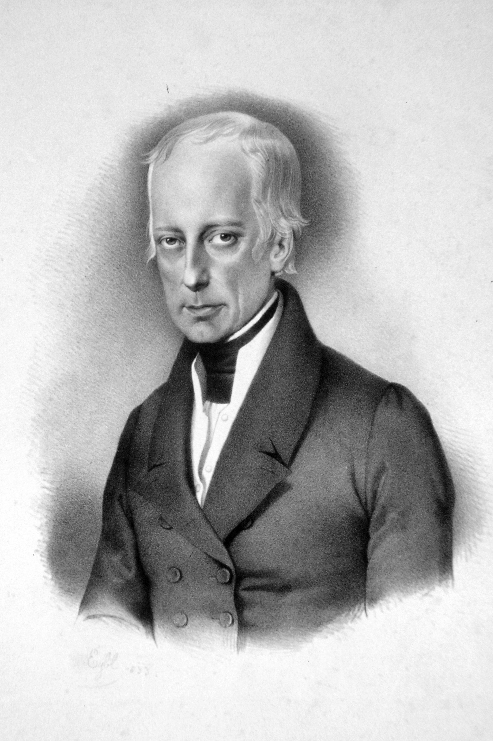 Franz I. (1768-1835), Kaiser von Österreich, König von Ungarn etc. Lithographie von Franz Eybl, 1832